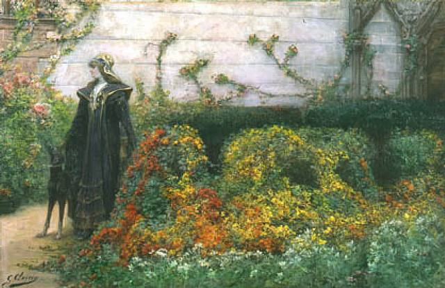 Sarah Bernhardt as Mélisande